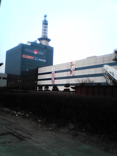 2007년에 제가 직접 찍어서 네이버 카페에 올린 사진입니다.